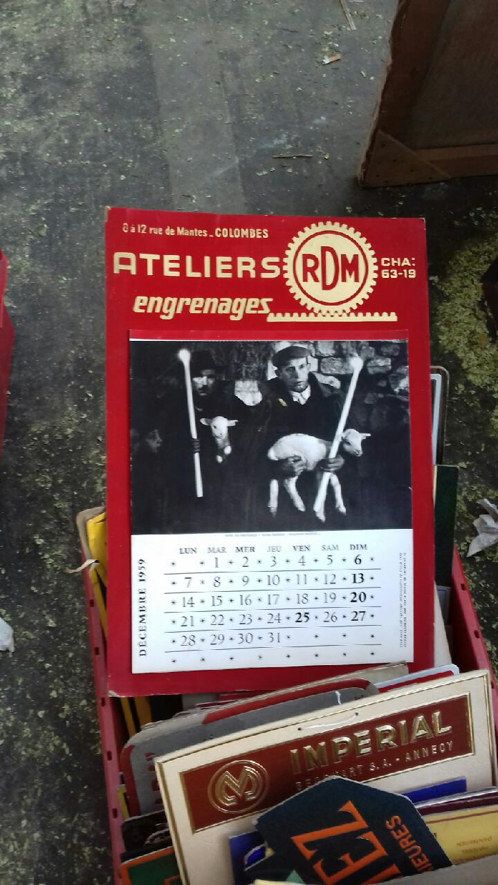 Calendrier mural de 1959. Mois de décembre. Ateliers RDM de Colombes.